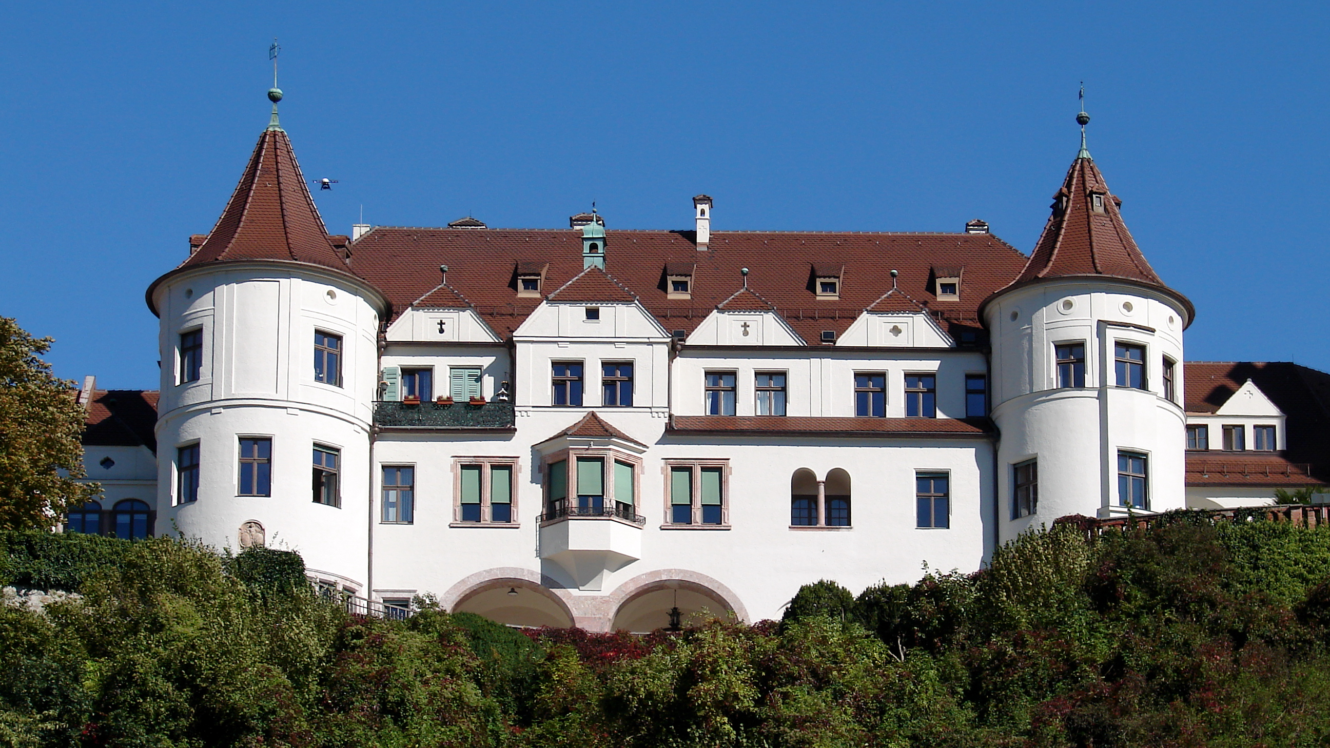 auf mittelalterlicher Ringburg, seit 1925 Internat; Anlage aus mehreren Jahrhunderten, östliche Trakte aus aneinandergebauten dreigeschossigen Putzbauten mit Sattel- und Schopfwalmdächern, Zwerchhäusern, Rundbogen- und Segmentbogenfenstern, Eckturm mit Zwiebelhaube, Sterntüren und Loggia mit Stützsäule, im Kern romanisch, im 16. und 18. Jh. Ausbau zur Höhenburg; mit historischer Ausstattung, zentraler und westlicher Trakt als dreigeschossige Putzbauten mit zweigeschossigen Seitenflügeln, Ecktürmen mit Kegeldächern, welscher und Zwiebelhauben, Flacherkern, Zwerchhäusern, Rundbogenfenstern, Loggien, Tordurchfahrt, Eingangshalle und Putzgliederungen, Neorenaissancestil, im Kern 18. und 19. Jh., 1895-1908 Umbau und Neubau des Westflügels durch Gabriel v. Seidl; Schlosskapelle St. Augustin, Saalbau mit Satteldach, westlichem Dachreiter mit Kuppelhaube und Putzgliederungen, verbunden mit dem östlichen Trakt des Schlosses, im Kern ebenfalls romanisch, 2. Viertel 13. Jh., um 1600 umgestaltet, 1751 barocker Ausbau nach Plänen von Johann Baptist Gunetzrhainer durch Philipp Millauer; Tympanon bez. 1751; mit Ausstattung; Bergfried, romanischer Turm über quadratischem Grundriss aus Bruchsteinmauerwerk mit Zinnenkranz, 12. Jh.; Kapelle, Zeltdachbau mit Putzgliederungen, um 1900; Brunnen, rundes Wasserbassin mit zentralem Wasserspeier mit Meereswesen, Kalkstein, um 1900; Einfriedung, Brüstung mit Ballustern aus Kalkstein, um 1900, in den 1920er Jahren um einen schmiedeeisernen Zaun erweitert.